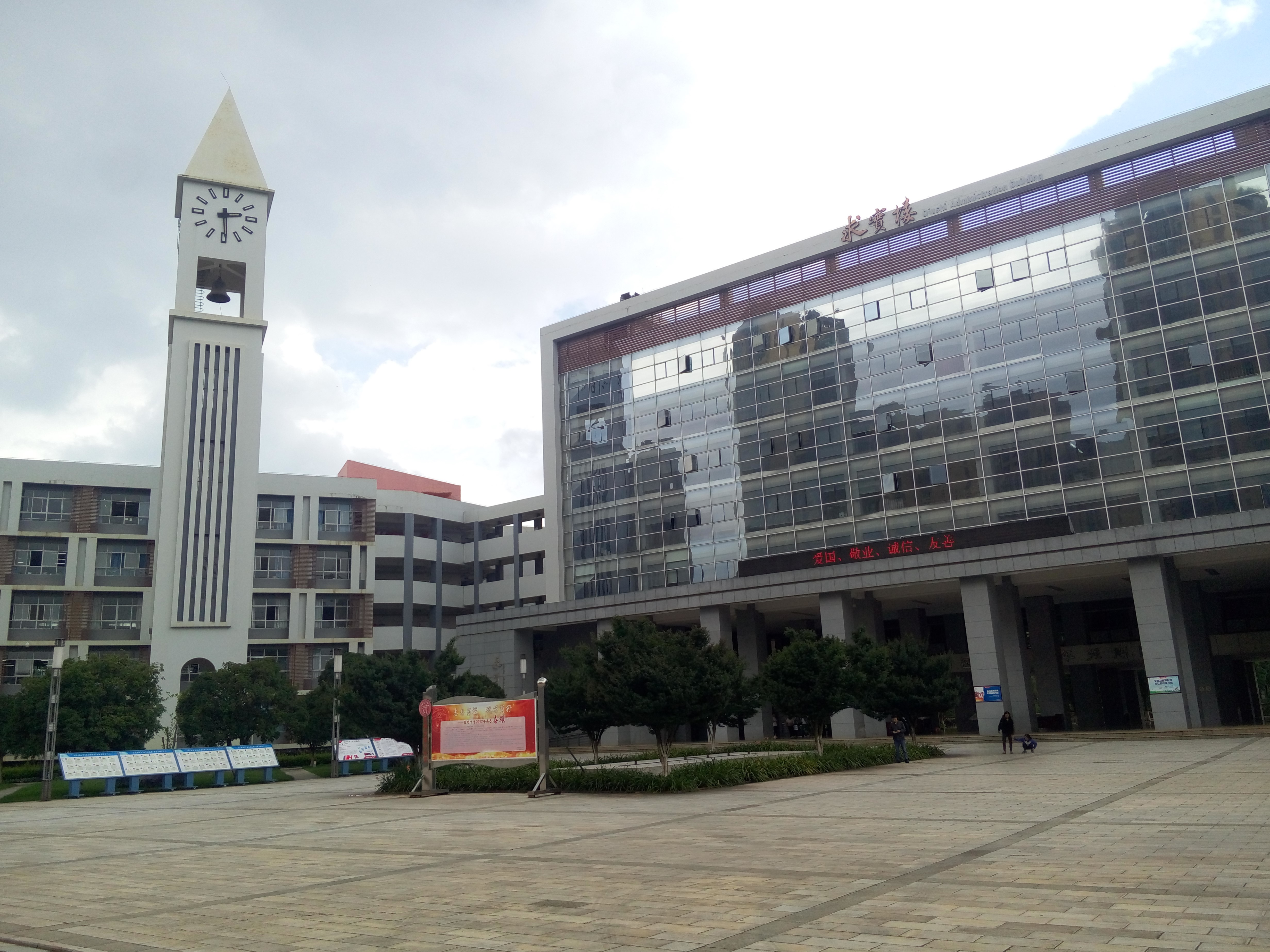 中文（中国大陆）: 行政楼与初中及高一高二教学楼